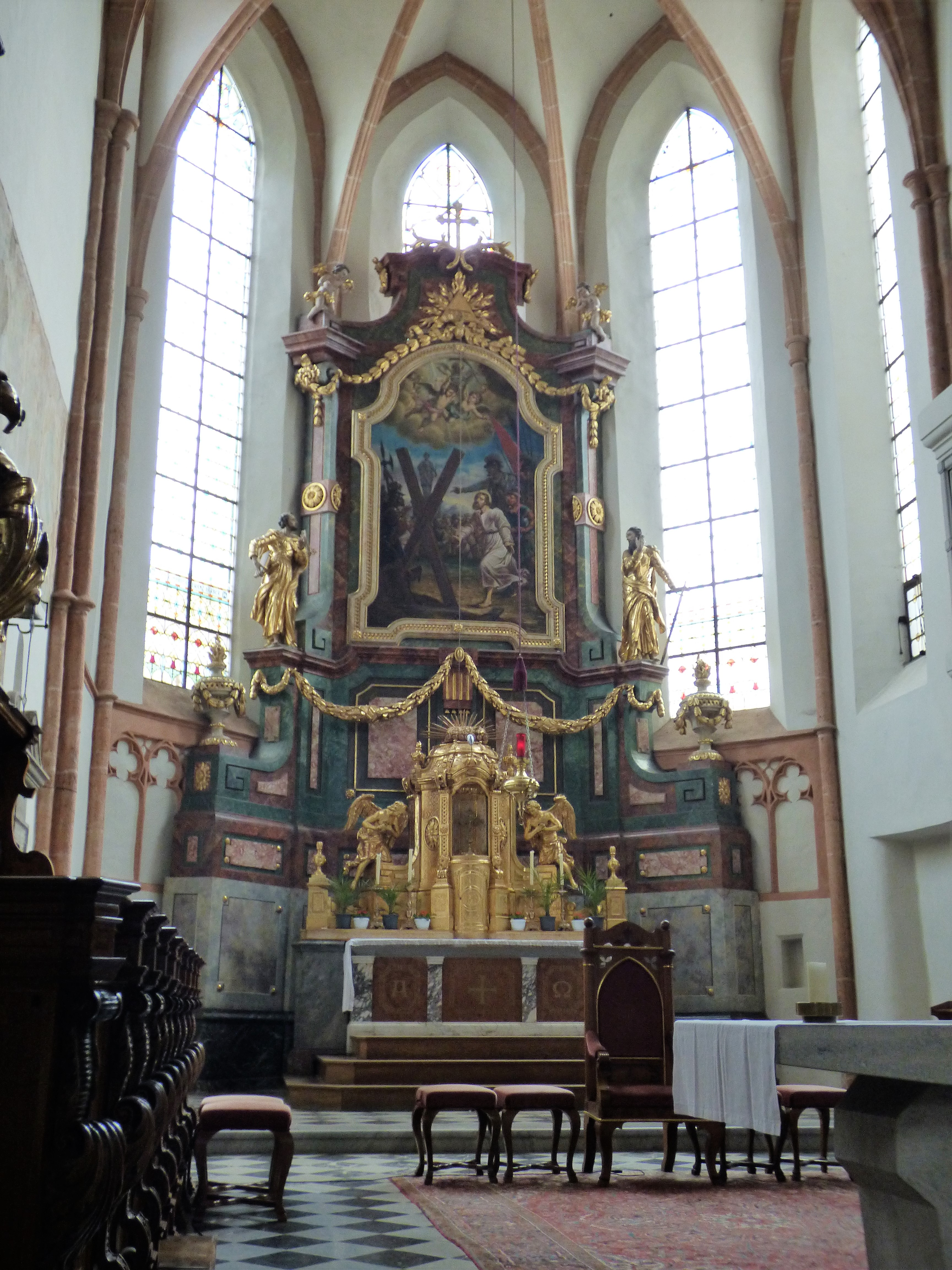 ehemalige Stiftskirche Göss (bei Leoben, Steiermark): Hauptaltar